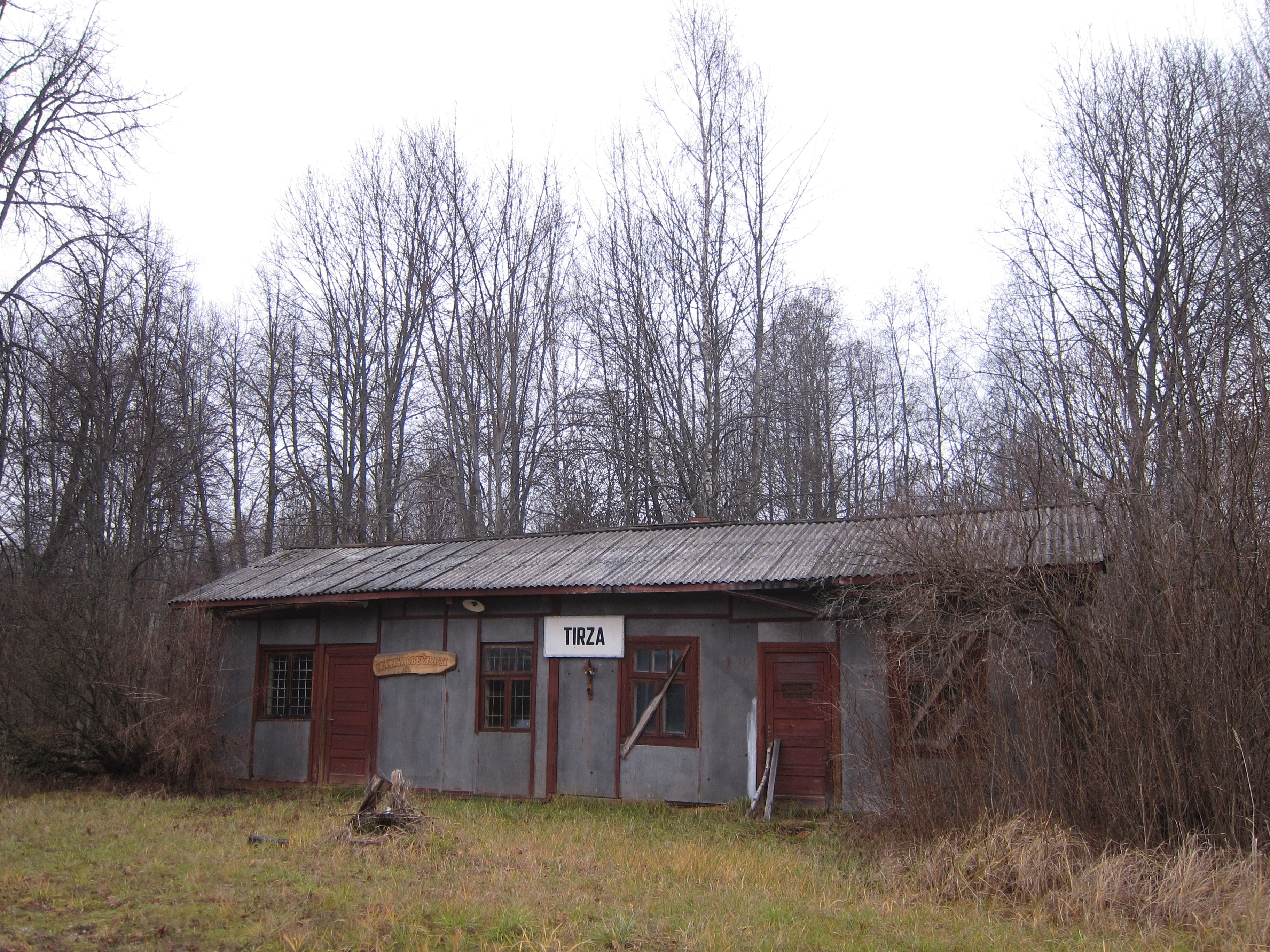 Bijusī Tirzas stacija